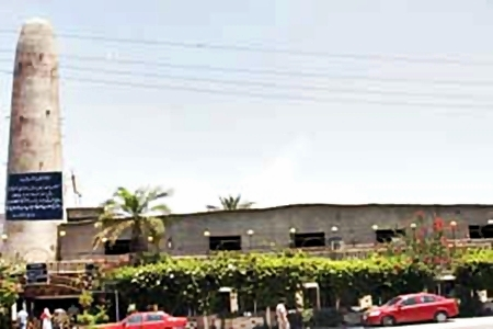 برج المنوفية